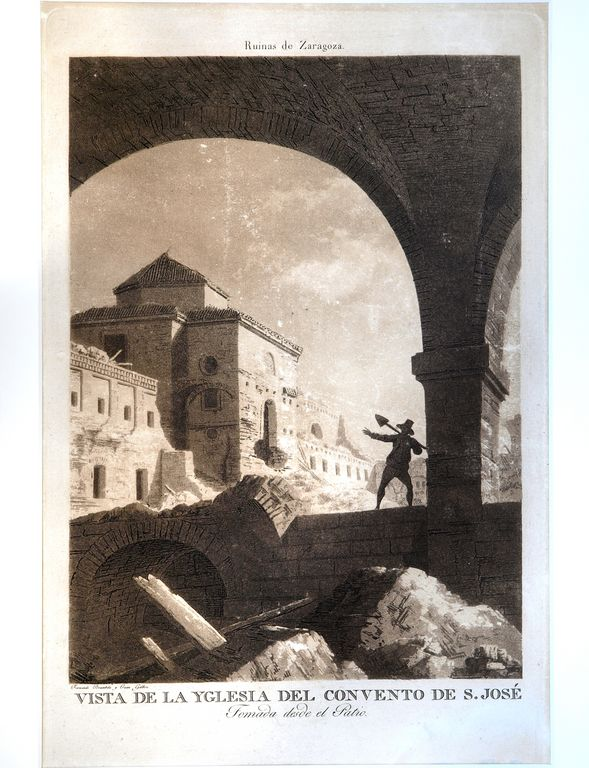 View of the church of the Convent of San José (Zaragoza) (Series "Ruinas de Zaragoza" (after the French sieges in Zaragoza), 32) Provincial Government of Zaragoza's collection, NIG 2117